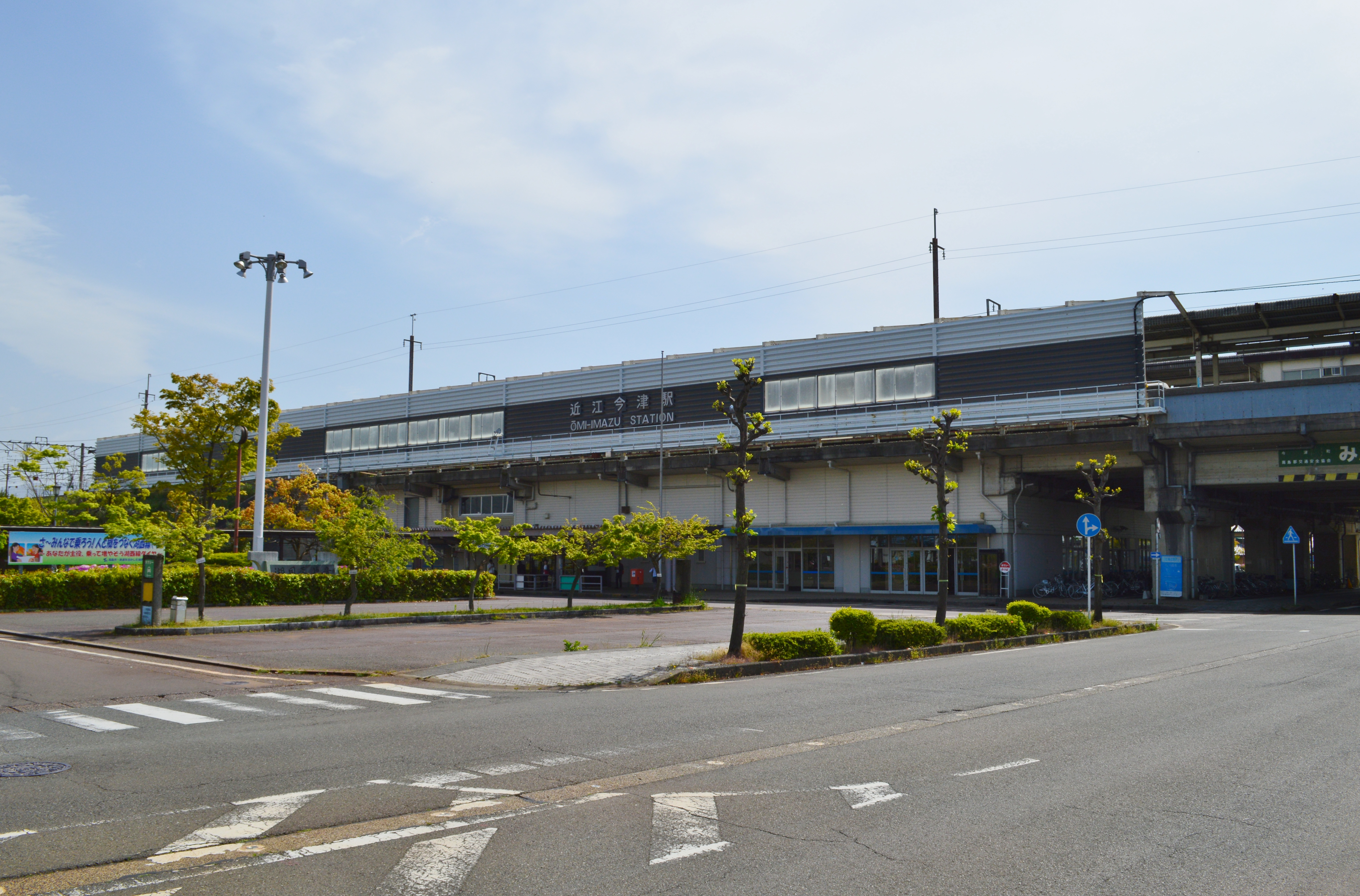 近江今津駅 駅舎